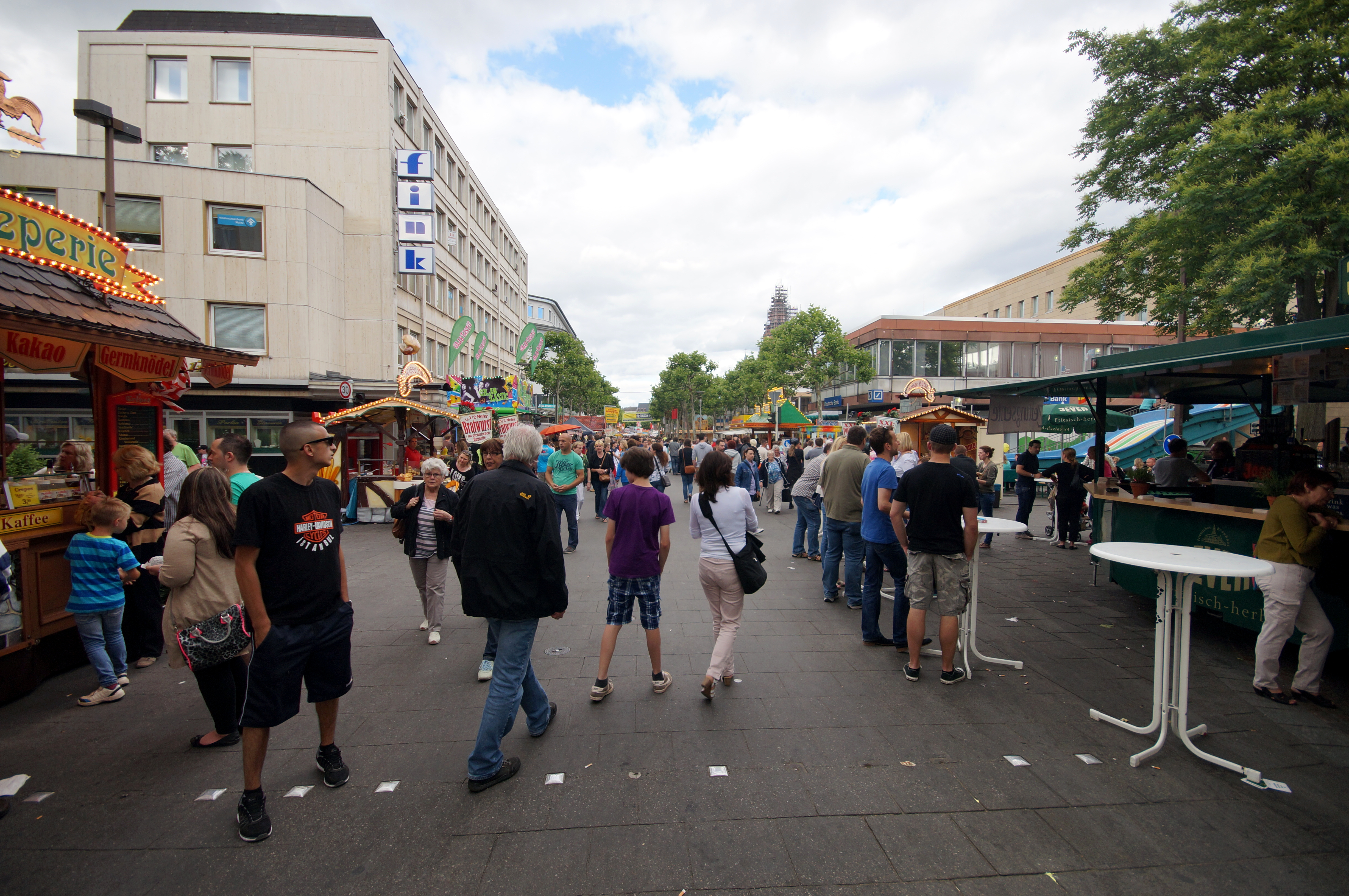 Feiern der Mainzer Johannisnacht auf der Mainzer Ludwigsstraße, Blickrichtung Gutenbergplatz